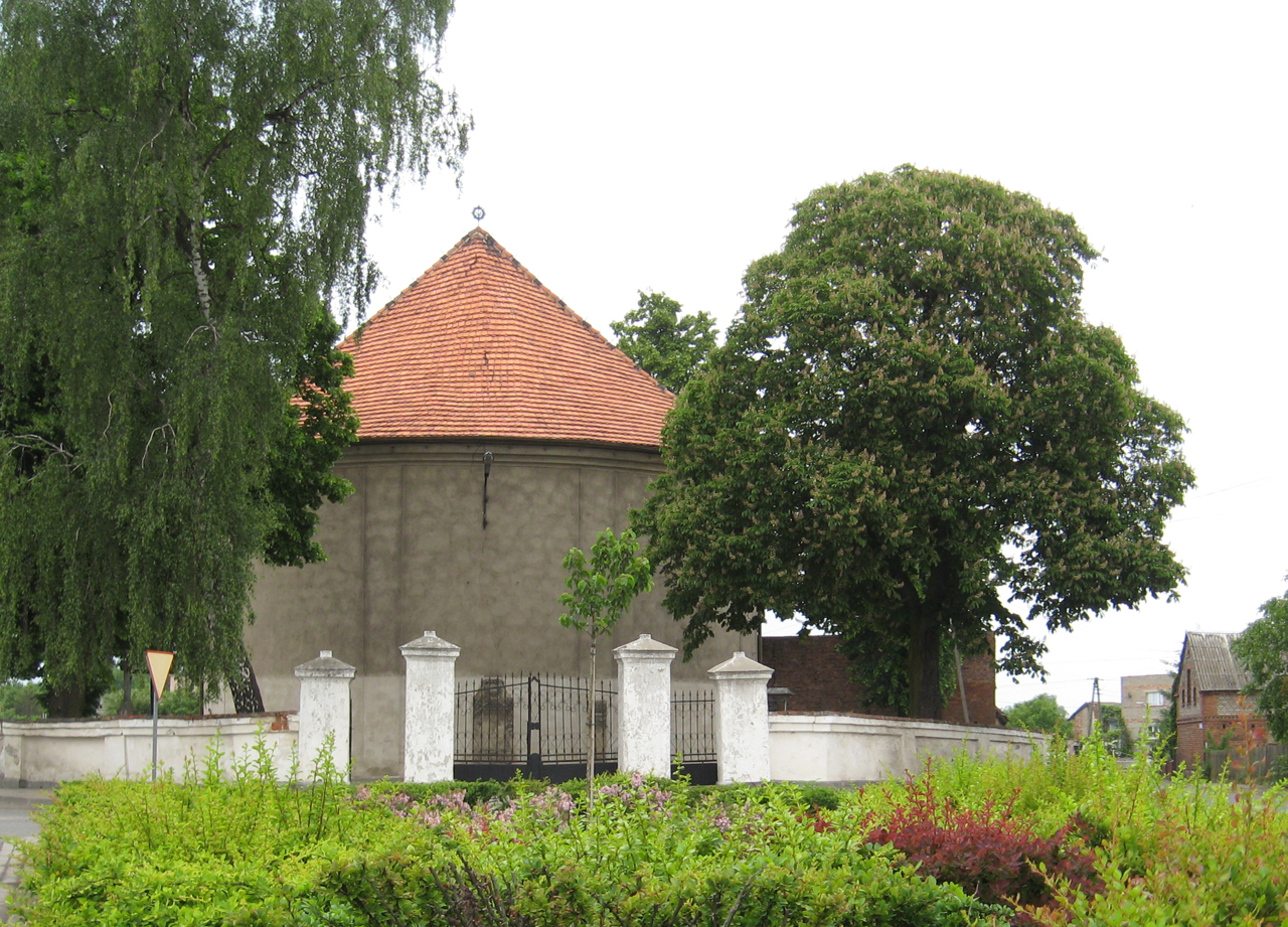 Gołanice